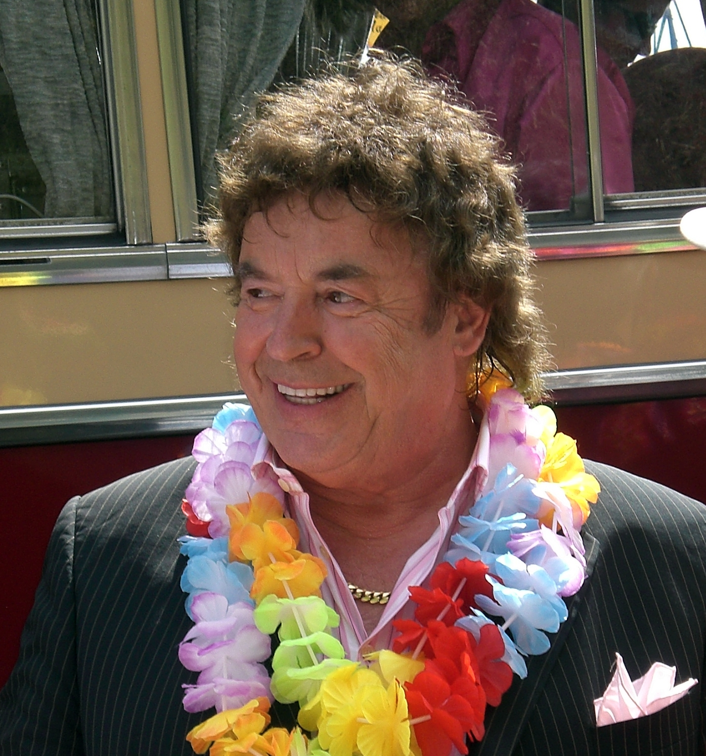 Tony Marshall auf dem Schlagermove 2009 in Hamburg (Ausschnitt)